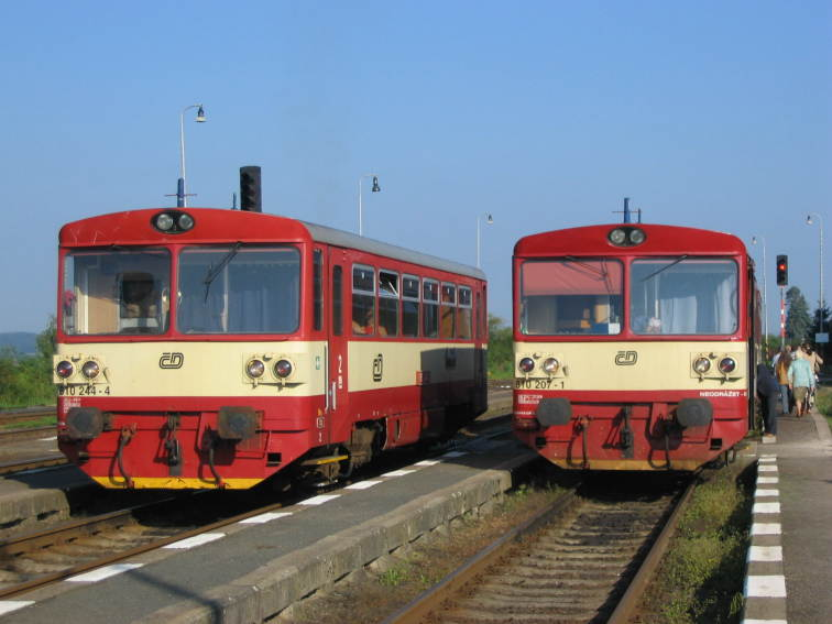 Motorový vůz 810, oblast stanice Libuň